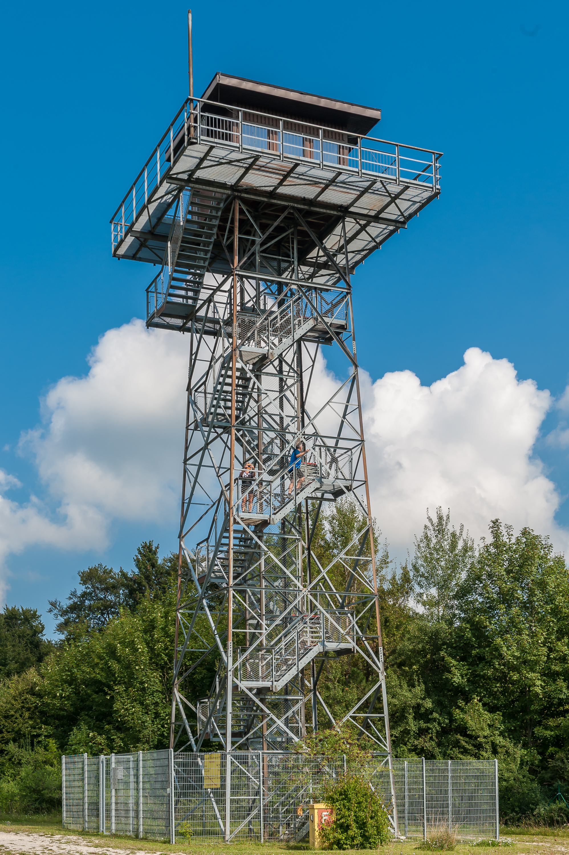 Waldgreutturm im Gutsbezirk Münsingen, Baden-Württemberg